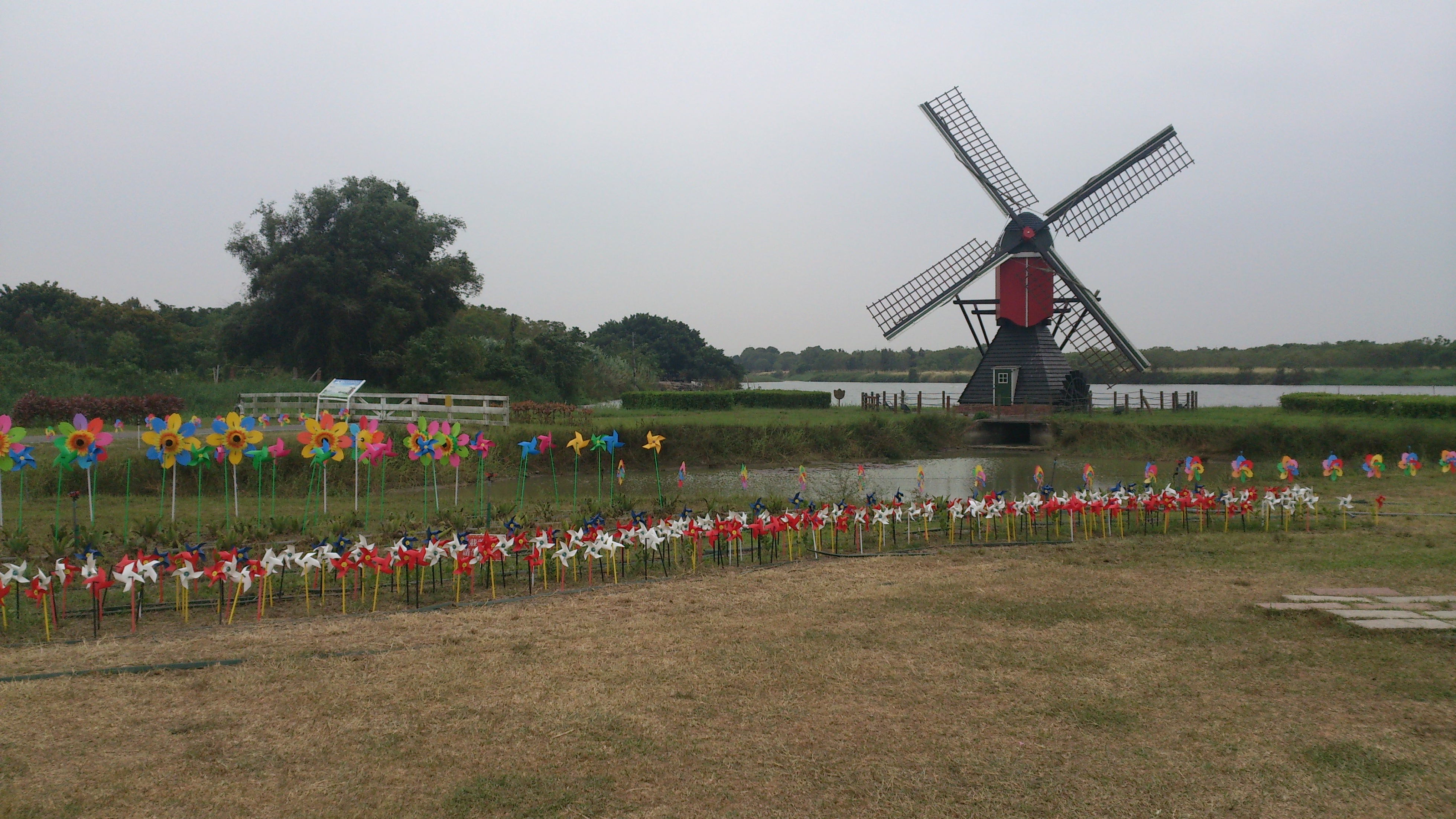 德元埤荷蘭村 Deyuanpi Holland Village